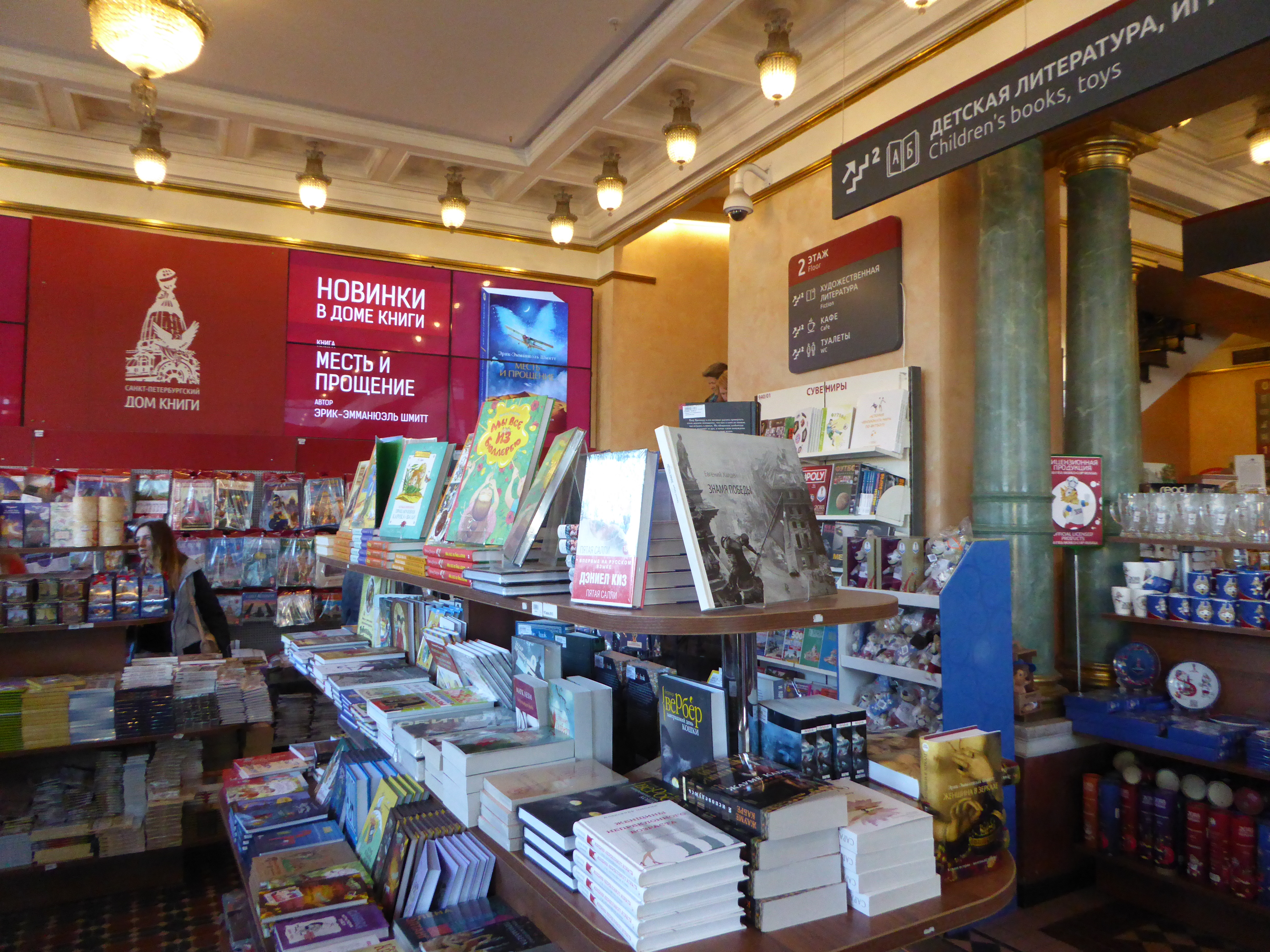 Дом компании 'Зингер': Невский проспект, 28, набережная канала Грибоедова, 21, Центральный район, Санкт-Петербург